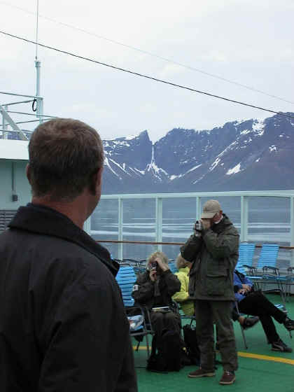 Mt. Masdalkloven, near Barstadvik, Ørsta, Norway seen from Storfjorden.